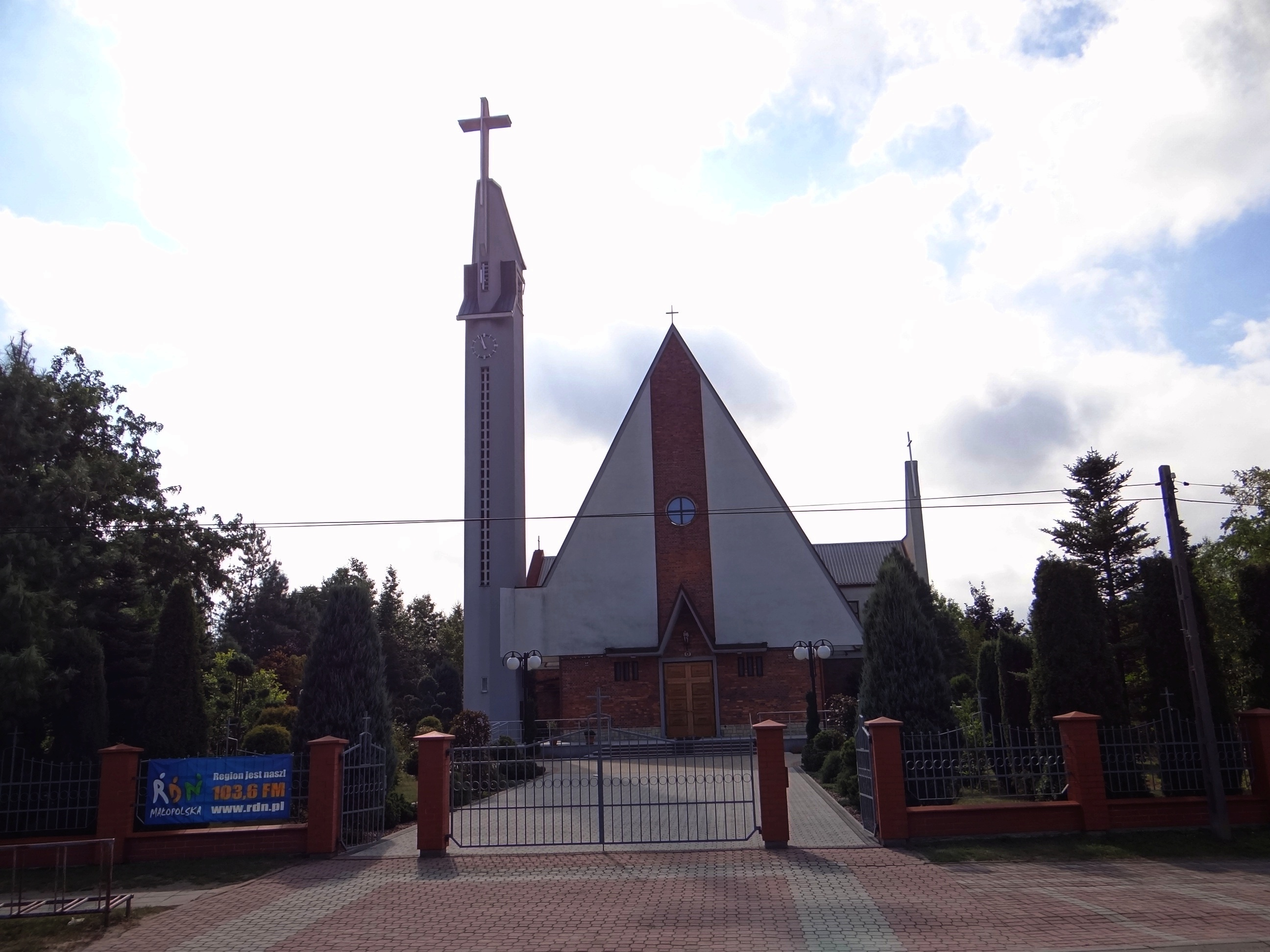 Kościół w Łętowicach